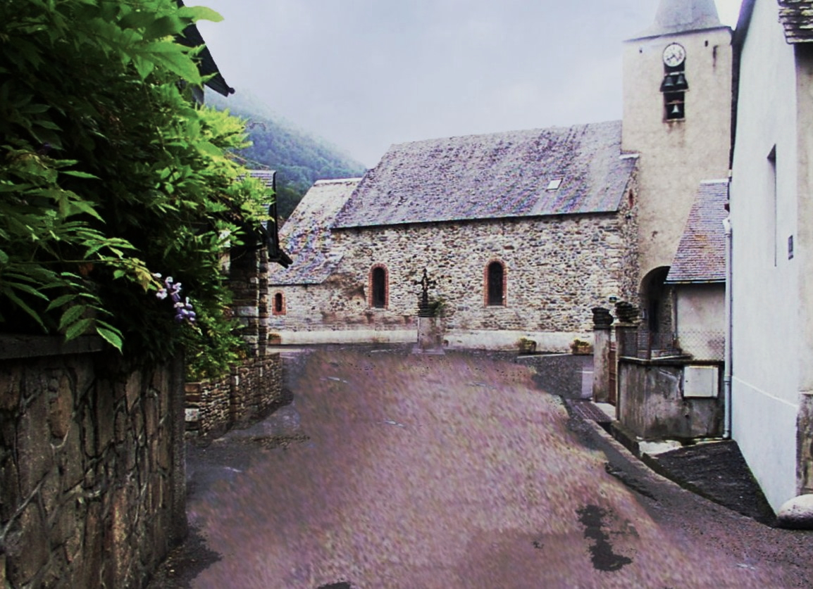 Loudenvielle dans les Hautes-Pyrénées Midi-Pyrénées